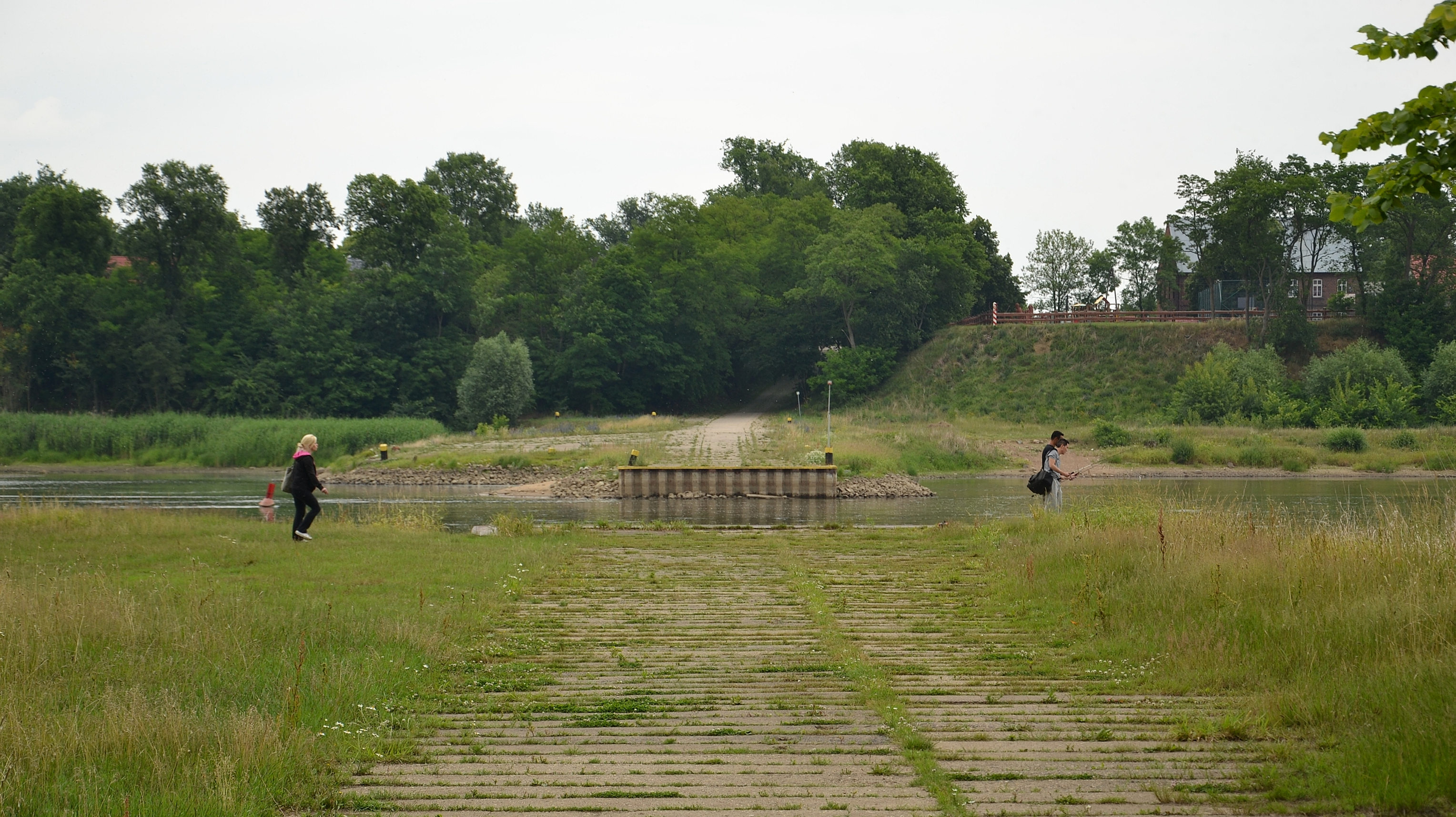 Miejsce po przeprawie promowej kursującej na Odrze do 1945 pomiędzy dwiema częściami miejscowości Aurith (dziś po polskiej stronie Urad).